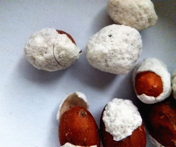 中文（台灣）: 束砂，潮汕地區食品